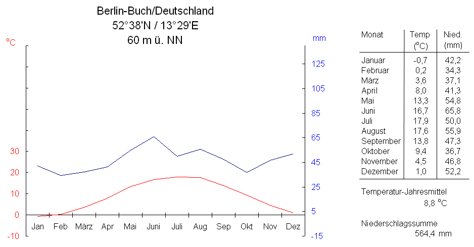 Berlin-Buch Klimadiagramm / climate chart